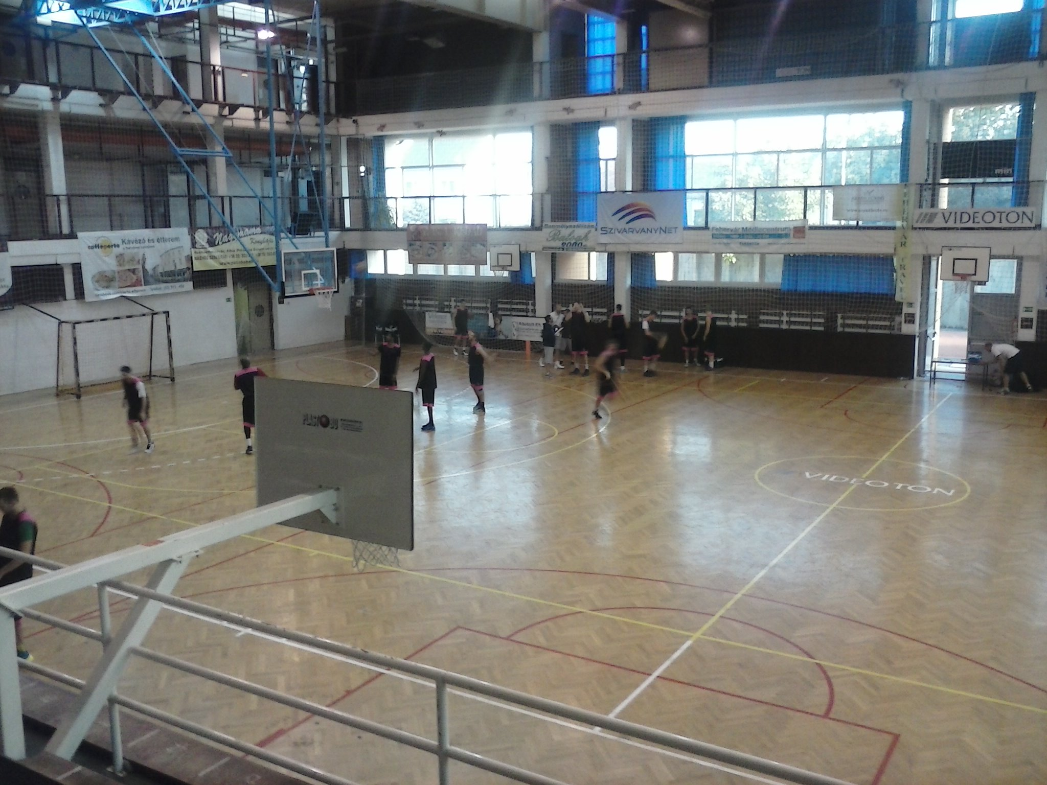 Vodafone sportcsarnok bal oldala, Székesfehérvár